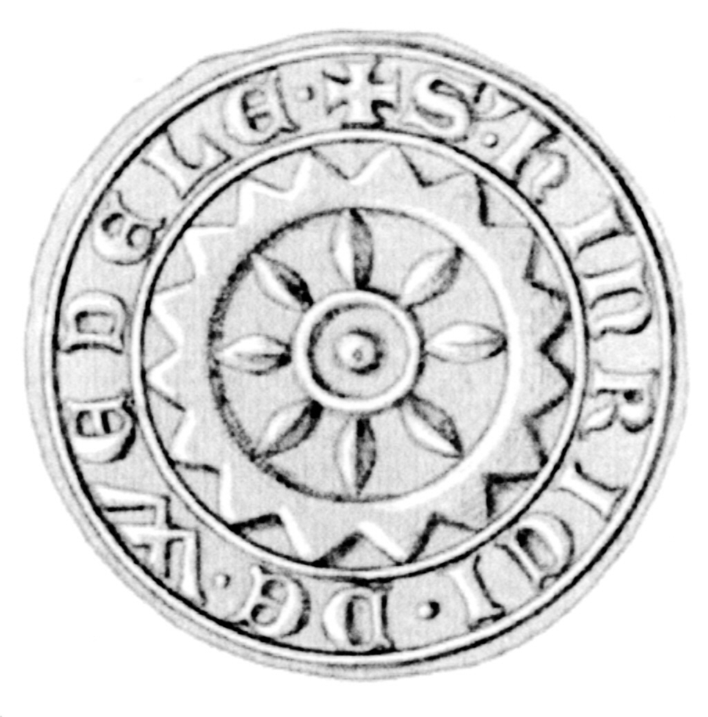 Siegel des Hinricus de Wedele. Das Siegel stammt aus der Zeit um 1322.